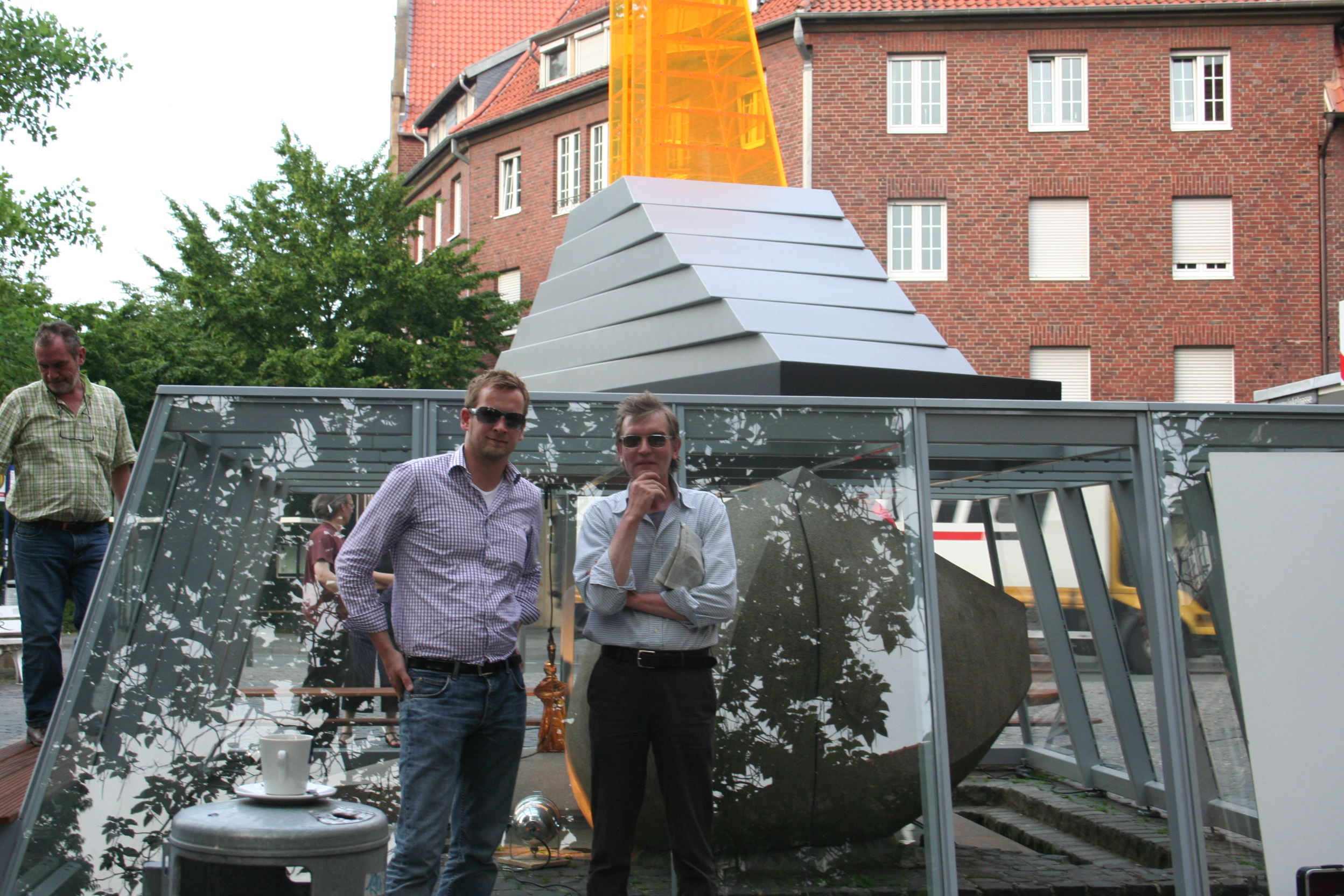 Künstler Thomas Schütte und Mario Heinzig vor der Skulptur in Münster